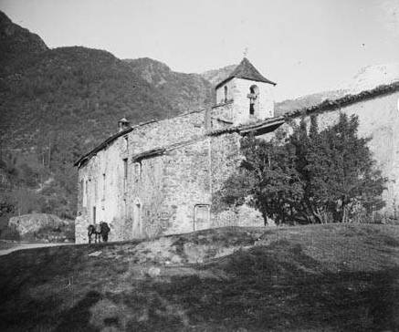 Imatge